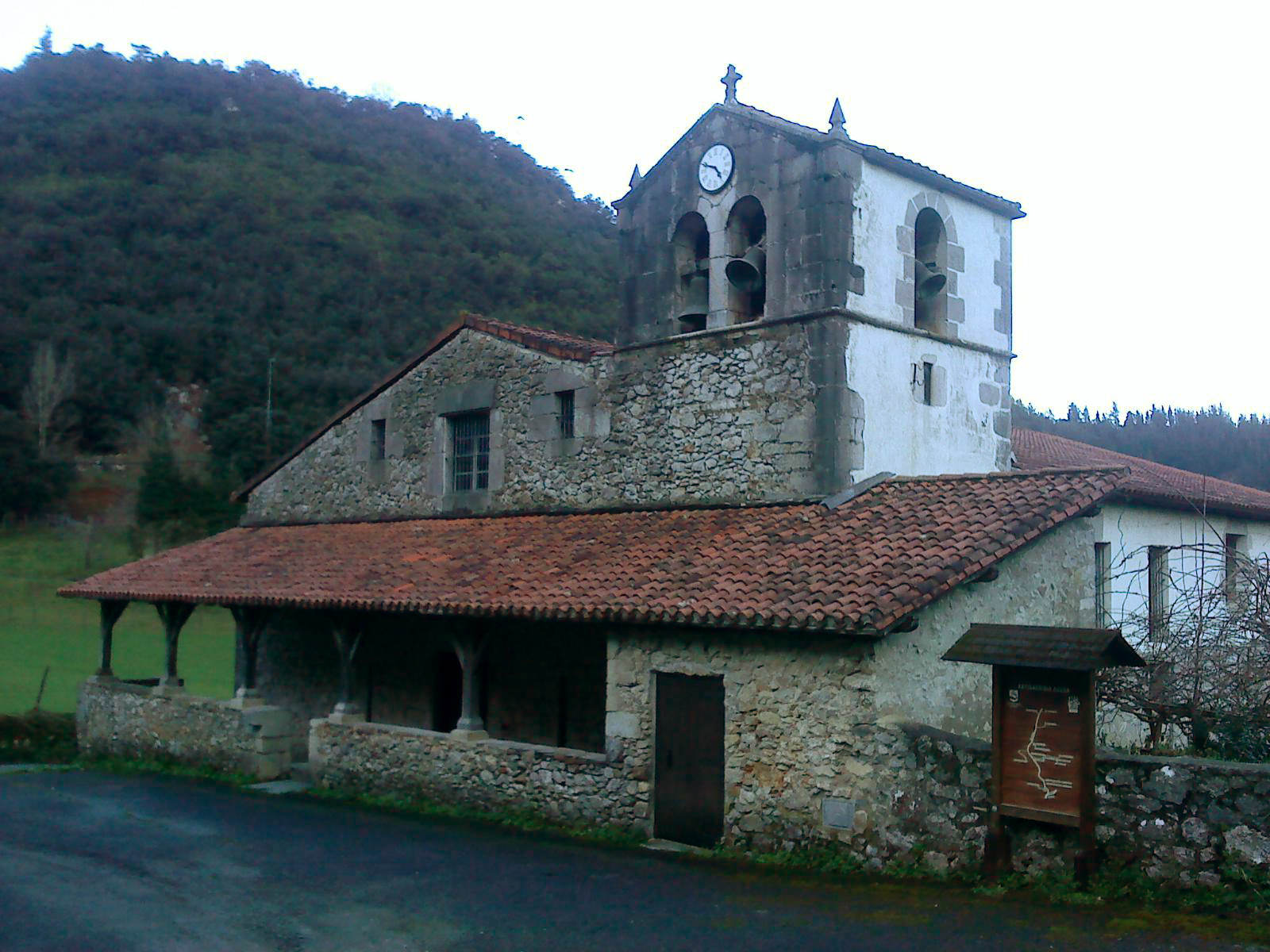 Iglesia de San Andrés de Astigarribia de Motrico Guipuzcoa, País Vasco (España)